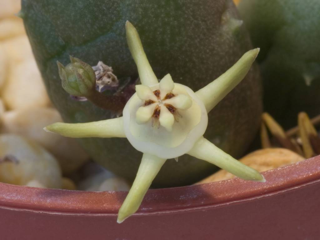 Flor de Duvalia parviflora.